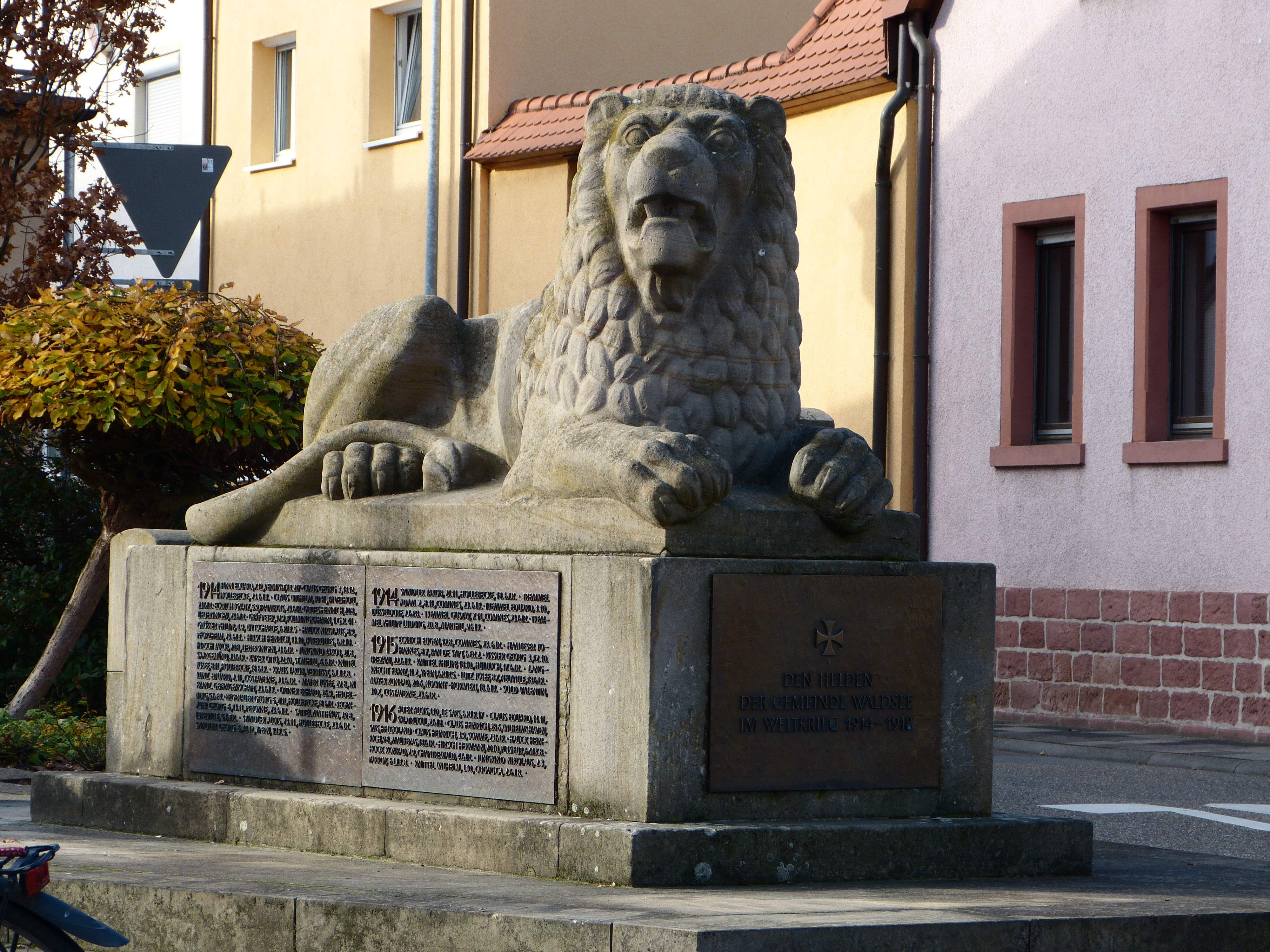 Waldsee: Kriegerdenkmal 1914/1918